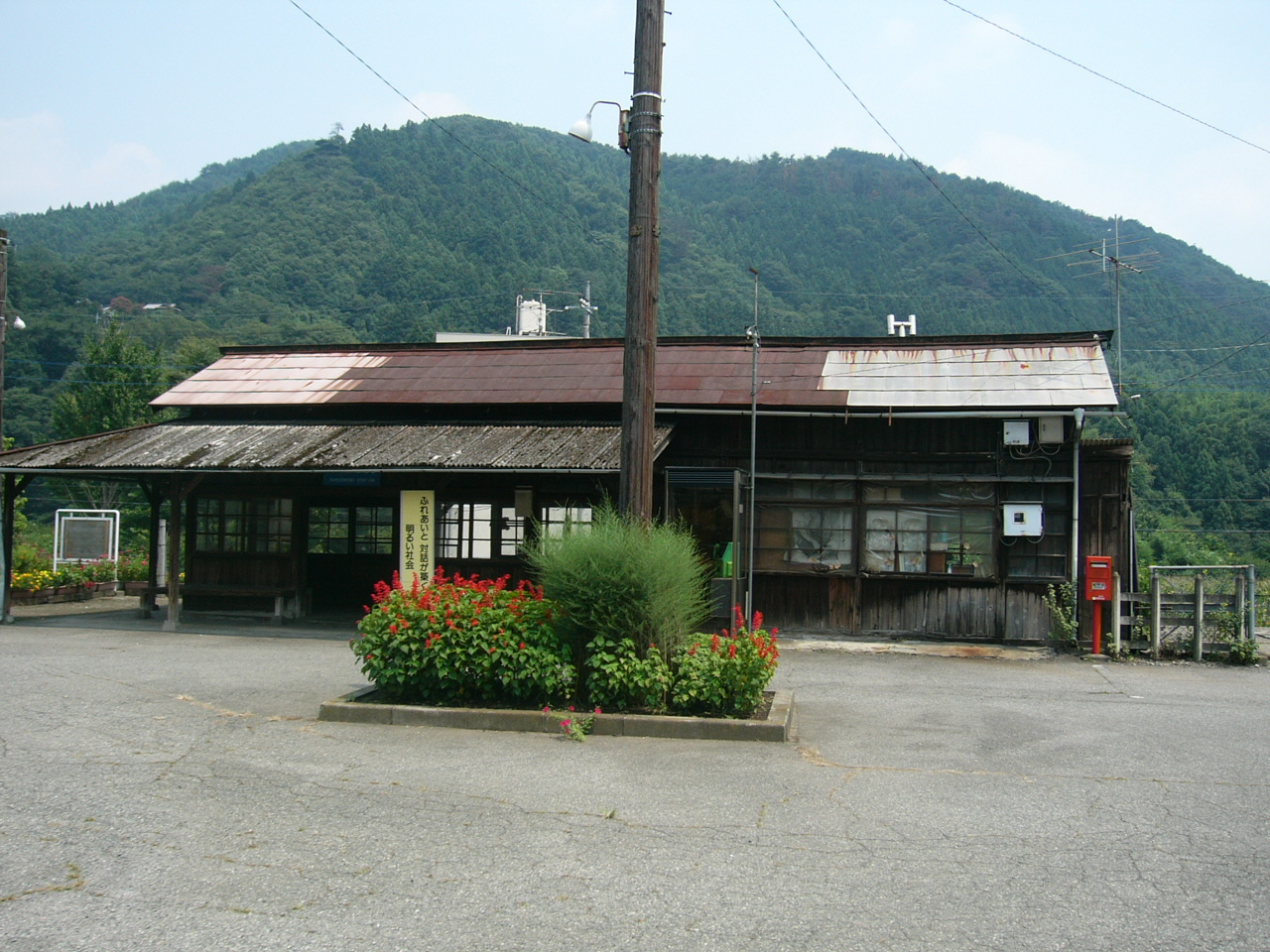 Kami-Kanbai Station